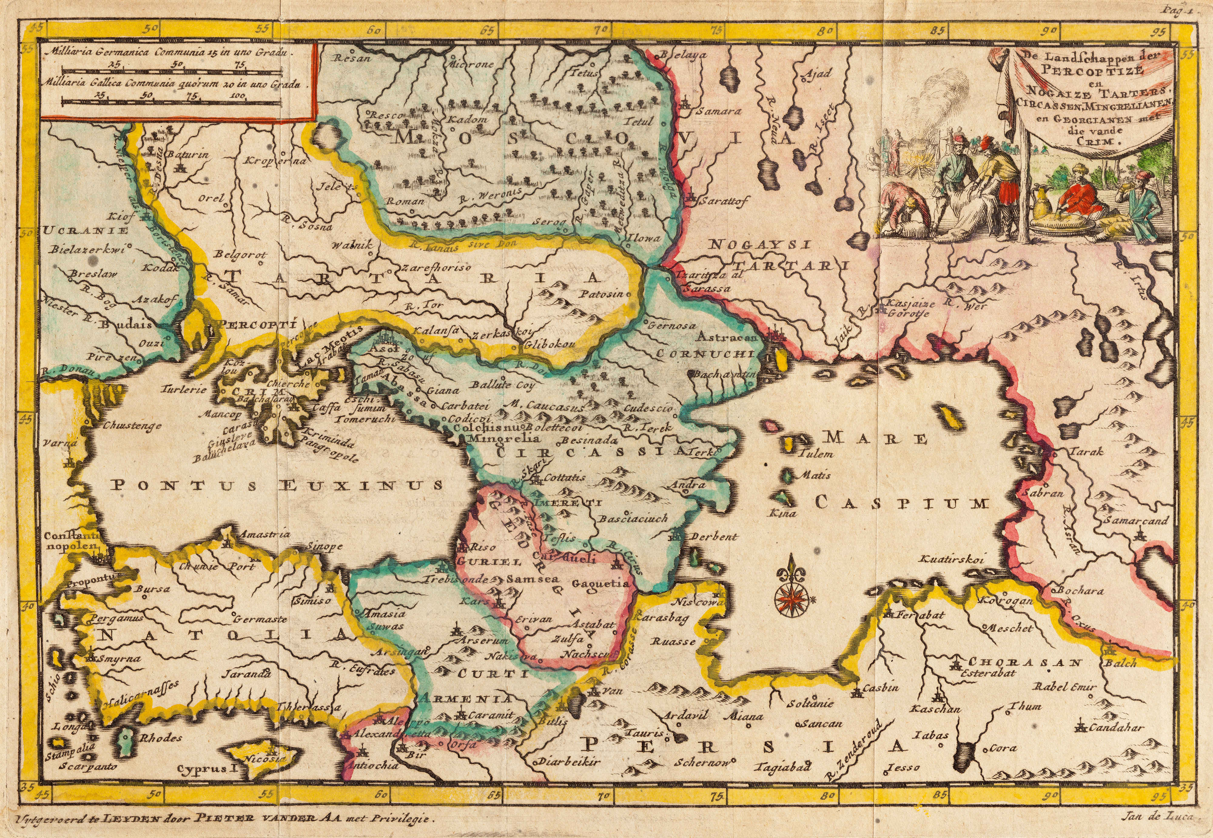 De Landschappen der Percoptize en Nogaize Tartares, Circassen, P Van der Aa (Leiden, 1707) Карта Пітера Ван дер Аа [Piter Van der Aa] 1707 р. Виконана у популярній тогочасній проекції, коли на одному аркуші вміщували територію від Чорного до Каспійського моря. Карта вирізняється картушем із зображенням побутової сцени життя ногайських татар. Чітко окреслені політичні кордони України, що проходять по лінії течії Дніпра.